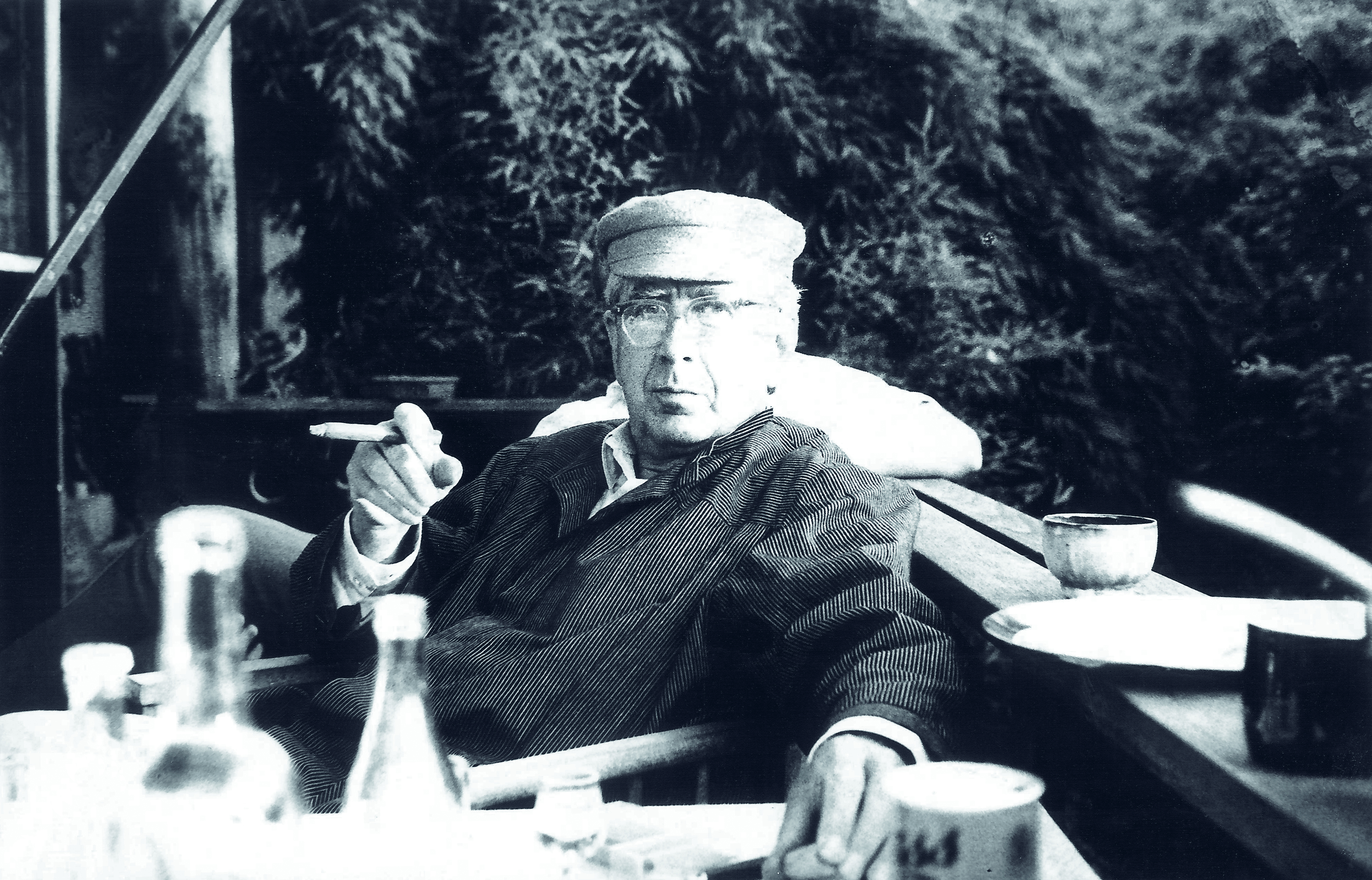 Magnus Læssøe Stephensen in his home